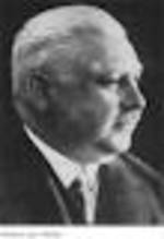 Jan Mařák- český houslista a hudební pedagog